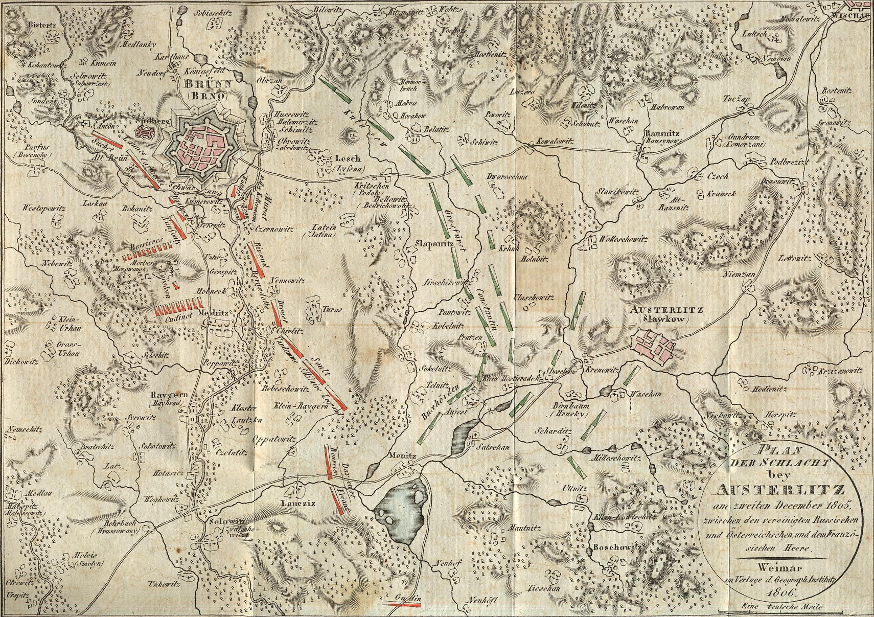 Karte Aufstellung Russische Armee Französische Armee Brünn Austerlitz Wischau